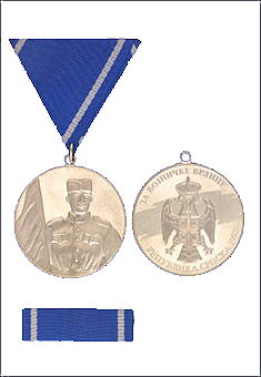 Srpski (latinica): Medalja za vojnicke vrline